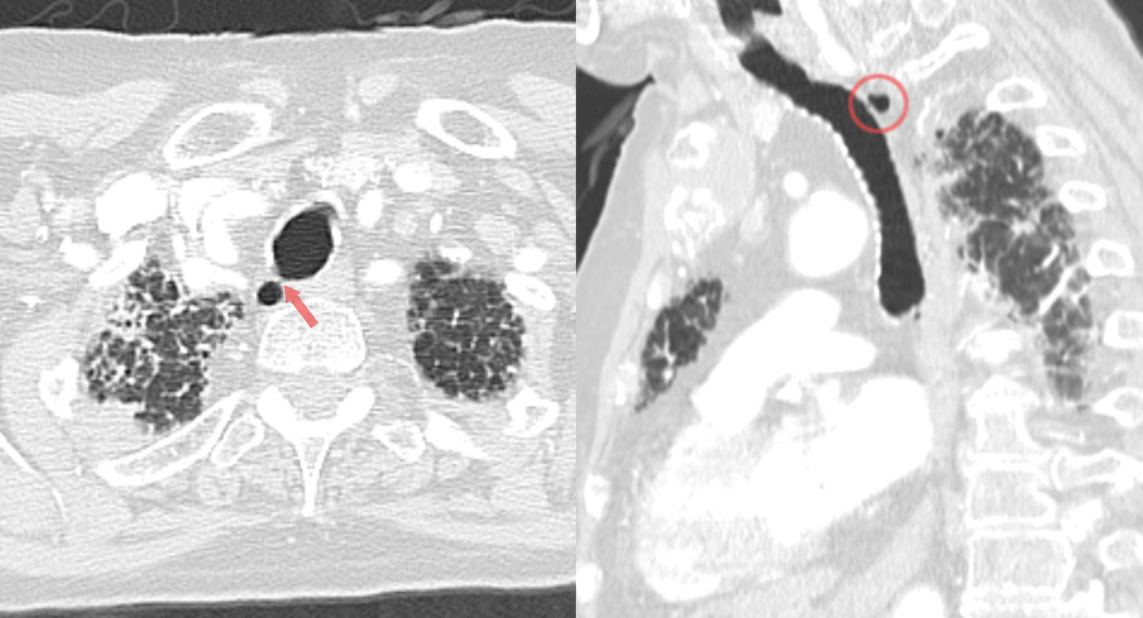 Computertomographie eines Trachealdivertikel an typischer Stelle rechts hinter der Trachea auf Höhe der oberen Thoraxapertur. Links axial, rechts schräg parasagittal. Man erkennt fein die Verbindung zur Trachea (Pfeil).